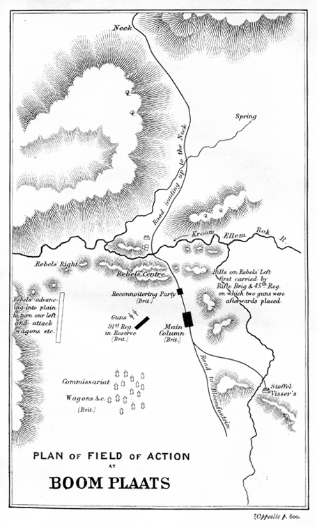 Plan de la bataille de Boomplaats livrée entre les Boers et les Britanniques le 29 août 1848. Gravure d'époque.